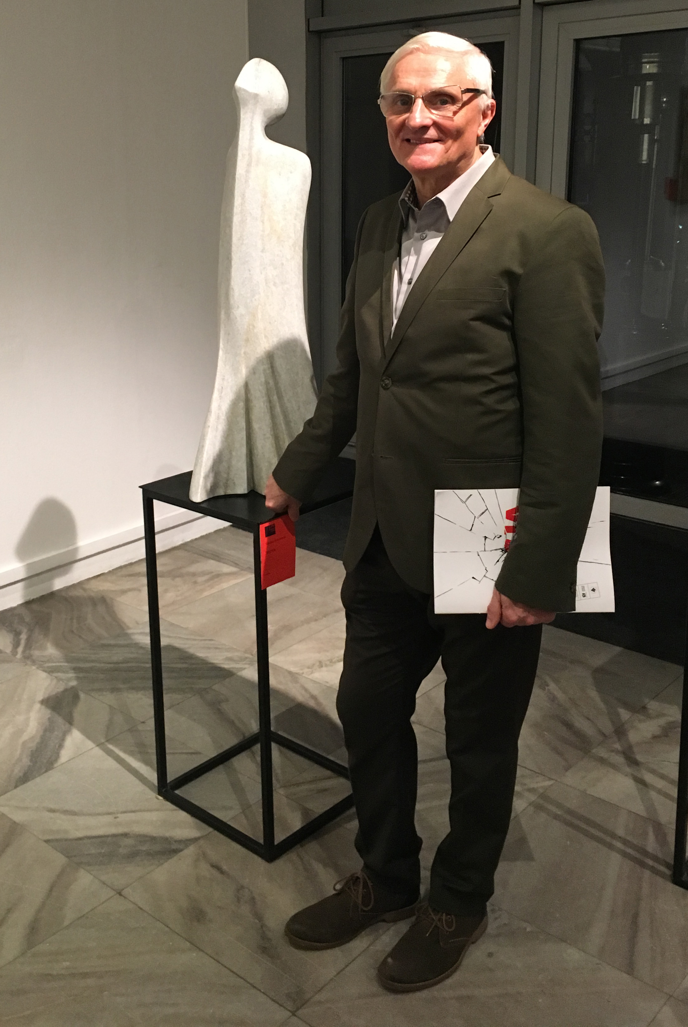 Czesław Kozanowski przy rzeźbie "Przybysz"